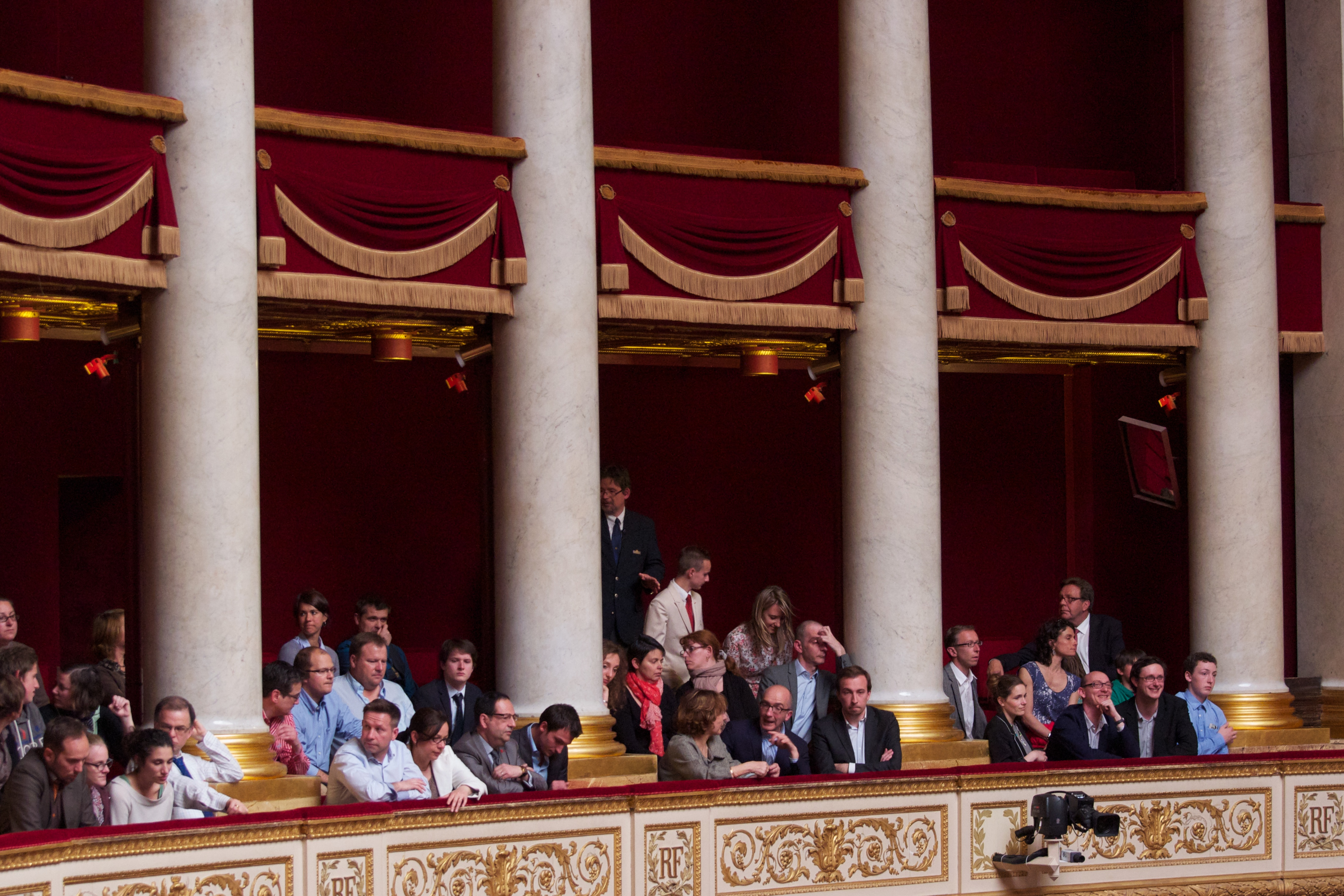 Vote solennel de la loi ouvrant le mariage aux couples de personnes de même sexe - Assemblée nationale